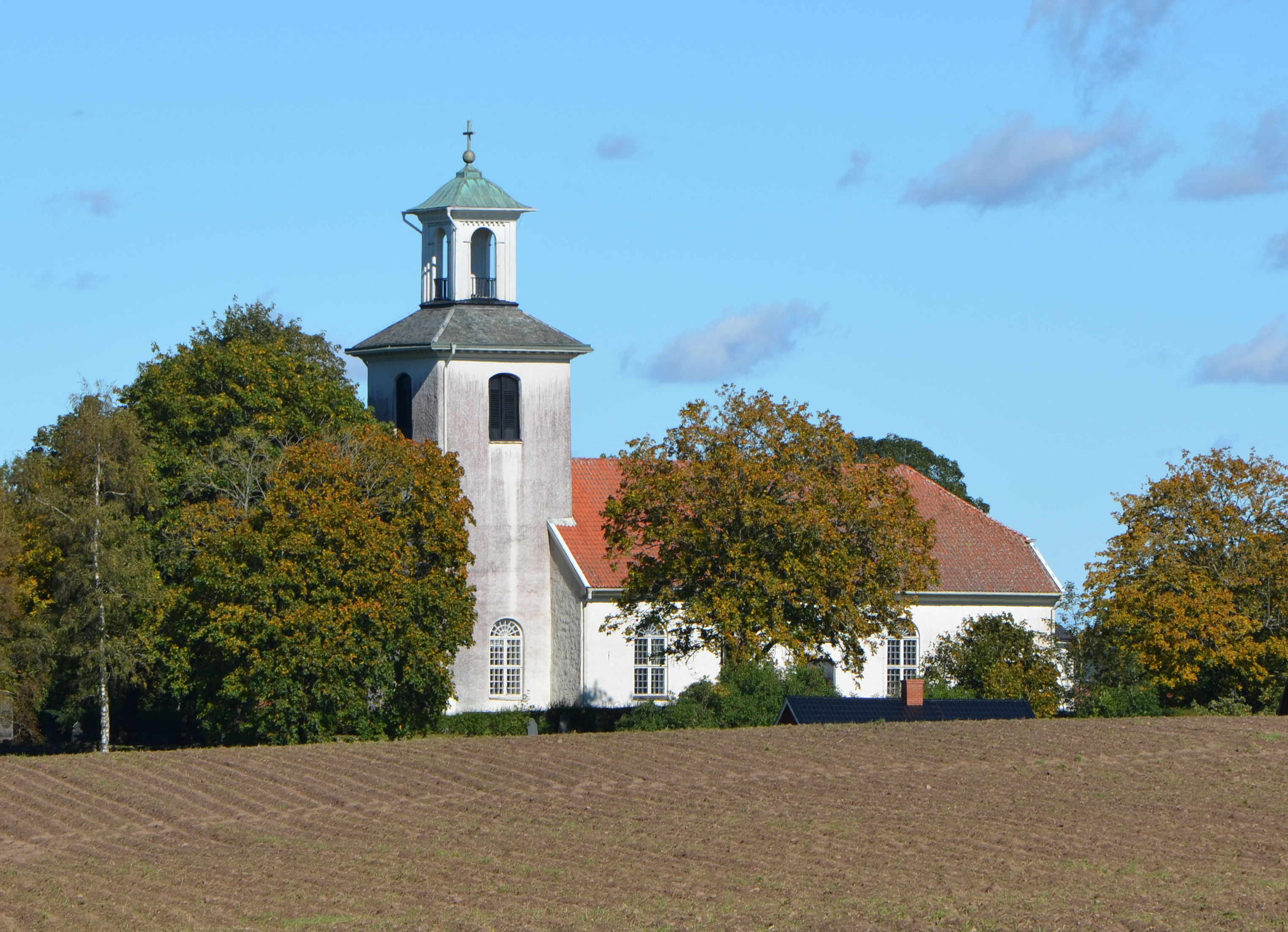 Kirche von Hössna, in der Gemeinde Ulricehamn, Västergötland